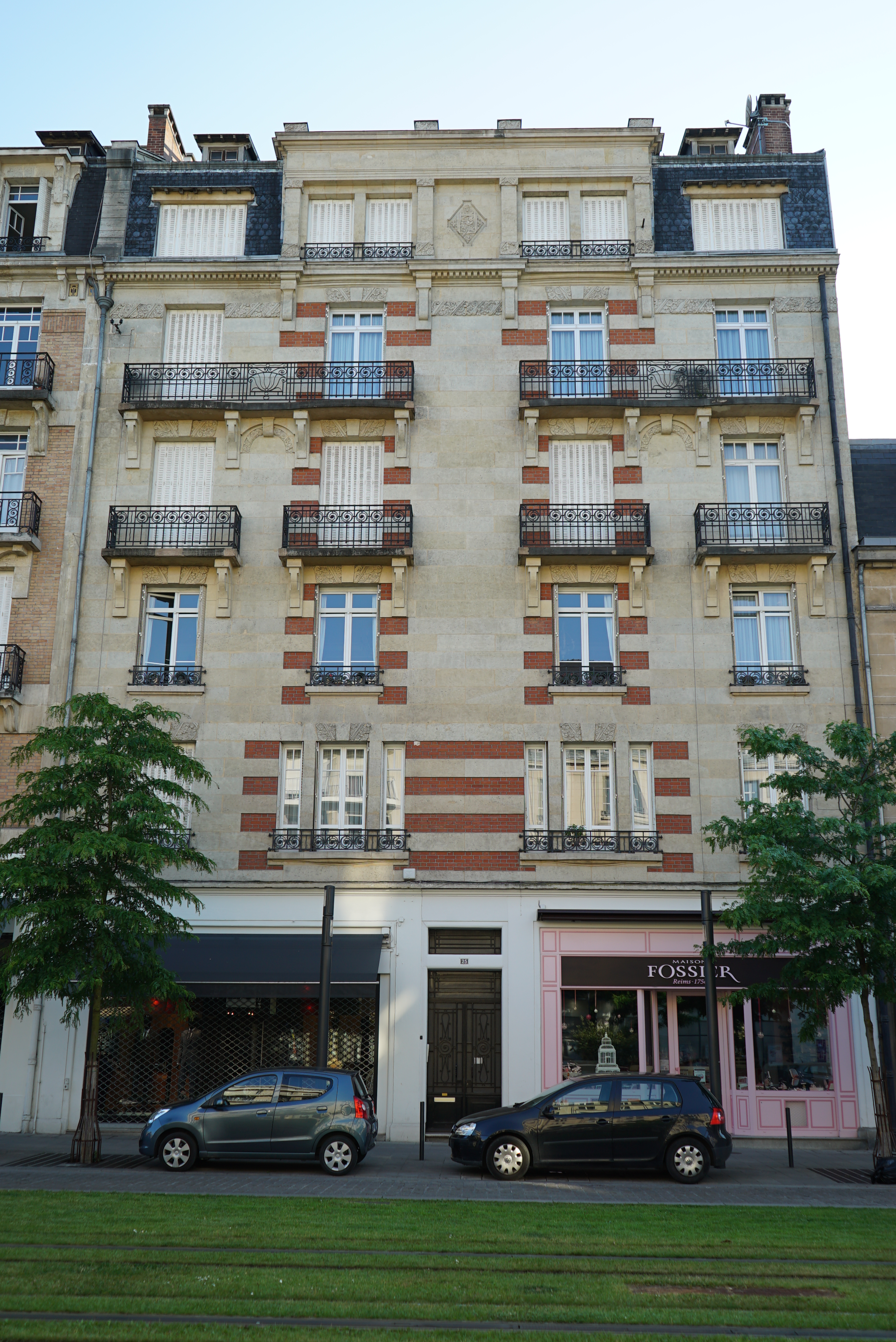 immeuble Cours Jean-Baptiste Langlet.